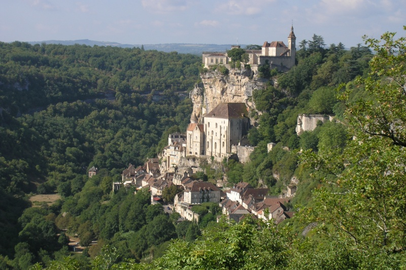 Vue de Rocamadour.